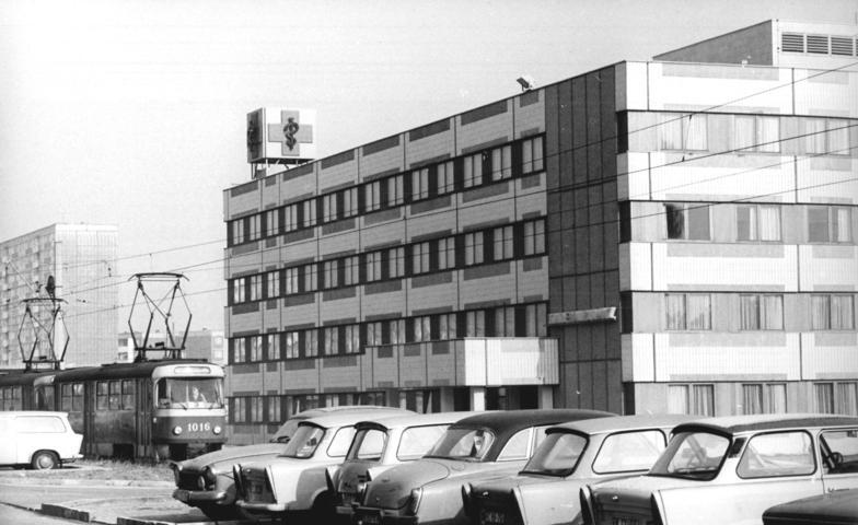 Halle, Krankenhaus, Poliklinik ADN-ZB Lehmann 6.3.86 Halle: Poliklinik. Mit 14 Fachabteilungen unter einem Dach bietet die Poliklinik in Halle-Silberhöhe - eine der jüngsten medizinischen Einrichtungen der Stadt - täglich über 750 Patienten eine ambulante Grundbetreuung. Den 27 Fach- und 12 Assistenzärzten stehen moderne medizintechnische Geräte für Diagnostik und Therapie zur Verfügung. Neben OP- und Behandlungsräumen, Labors und einer Zentralsterilisation wurde im Erdgeschoß ein ganzer Bereich für die Physiotherapie eingerichtet. Die 235 Mitarbeiter der Poliklinik betreuen rund 60.000 Bürger des Neubaugebietes und angrenzender Wohnsiedlungen. - siehe 16 und 17n